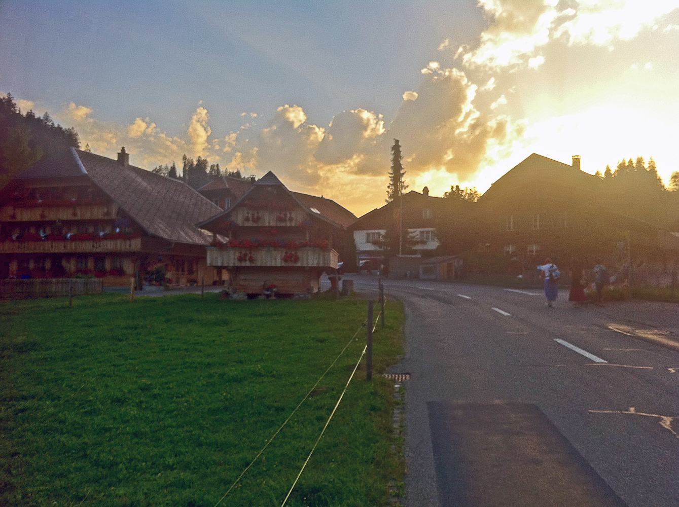 Röthenbach im Emmental